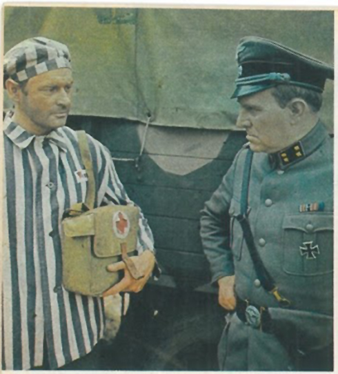 Fotos z filmu Ostatni świadek (1969) - Stanisław Mikulski i Janusz Bylczyński.